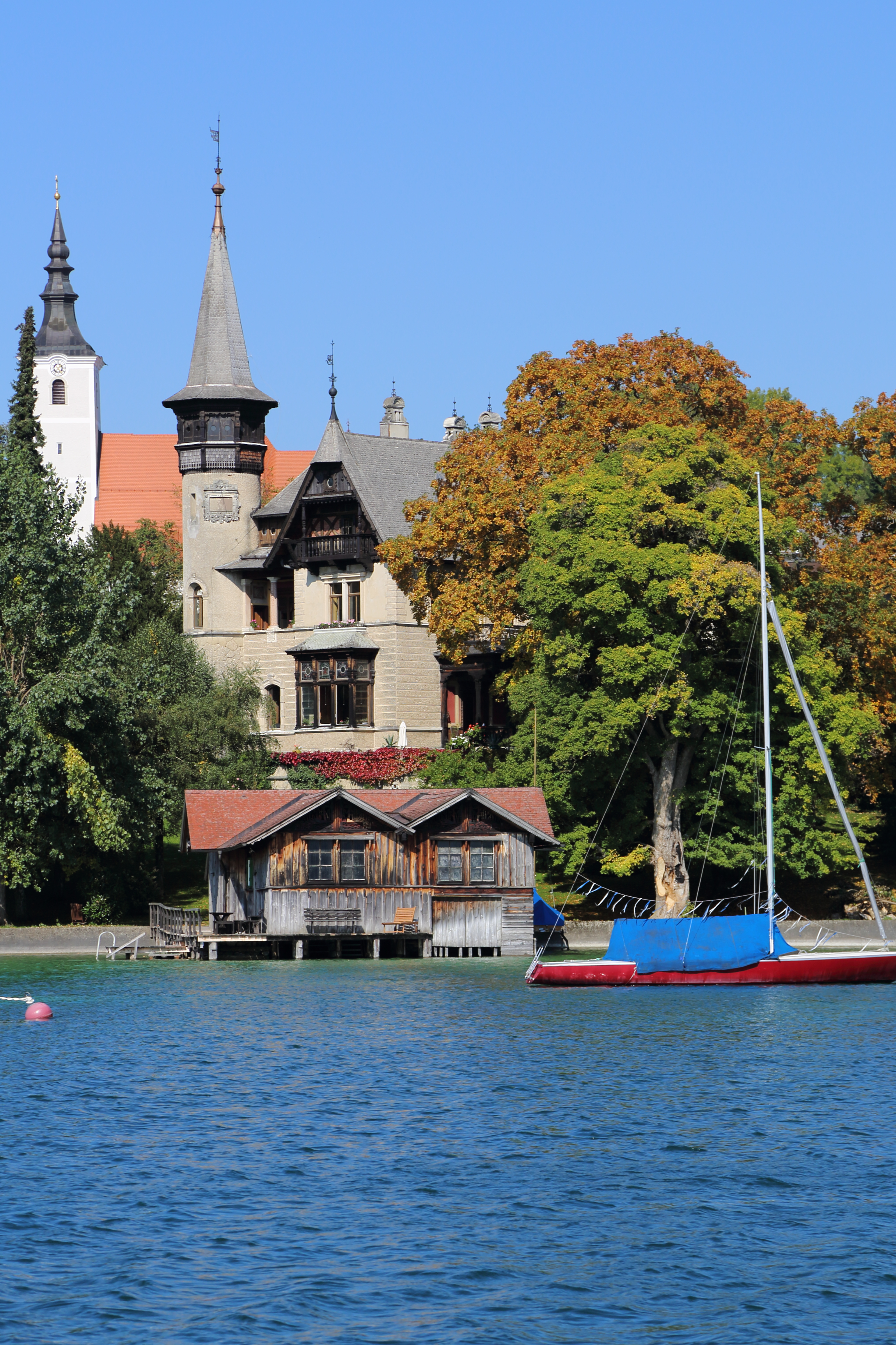 Paulick mansion from the waterside, Seewalchen (Austria) / Paulick-Villa von der Seeseite in Seewalchen am Attersee (Österreich)